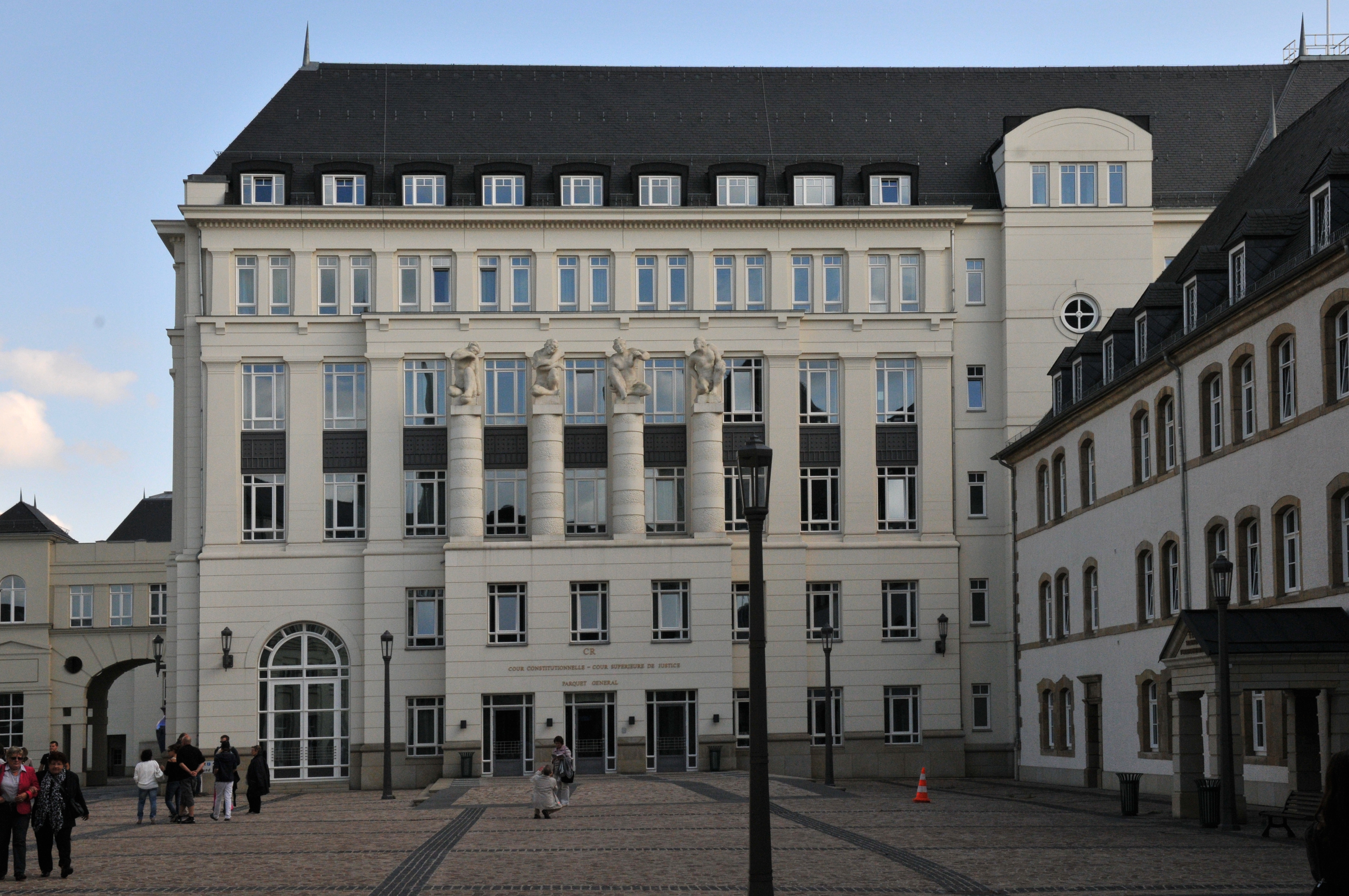 D'Cour constitutionnelle, d'Cour supérieure de justice an de Parquet général an der Cité judiciaire.